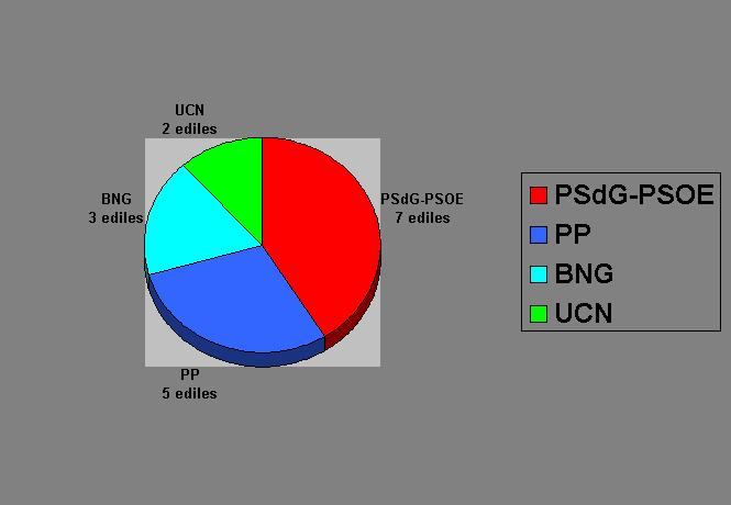 Resultado de las elecciones celebradas en 2007 en el Concello de Nigrán